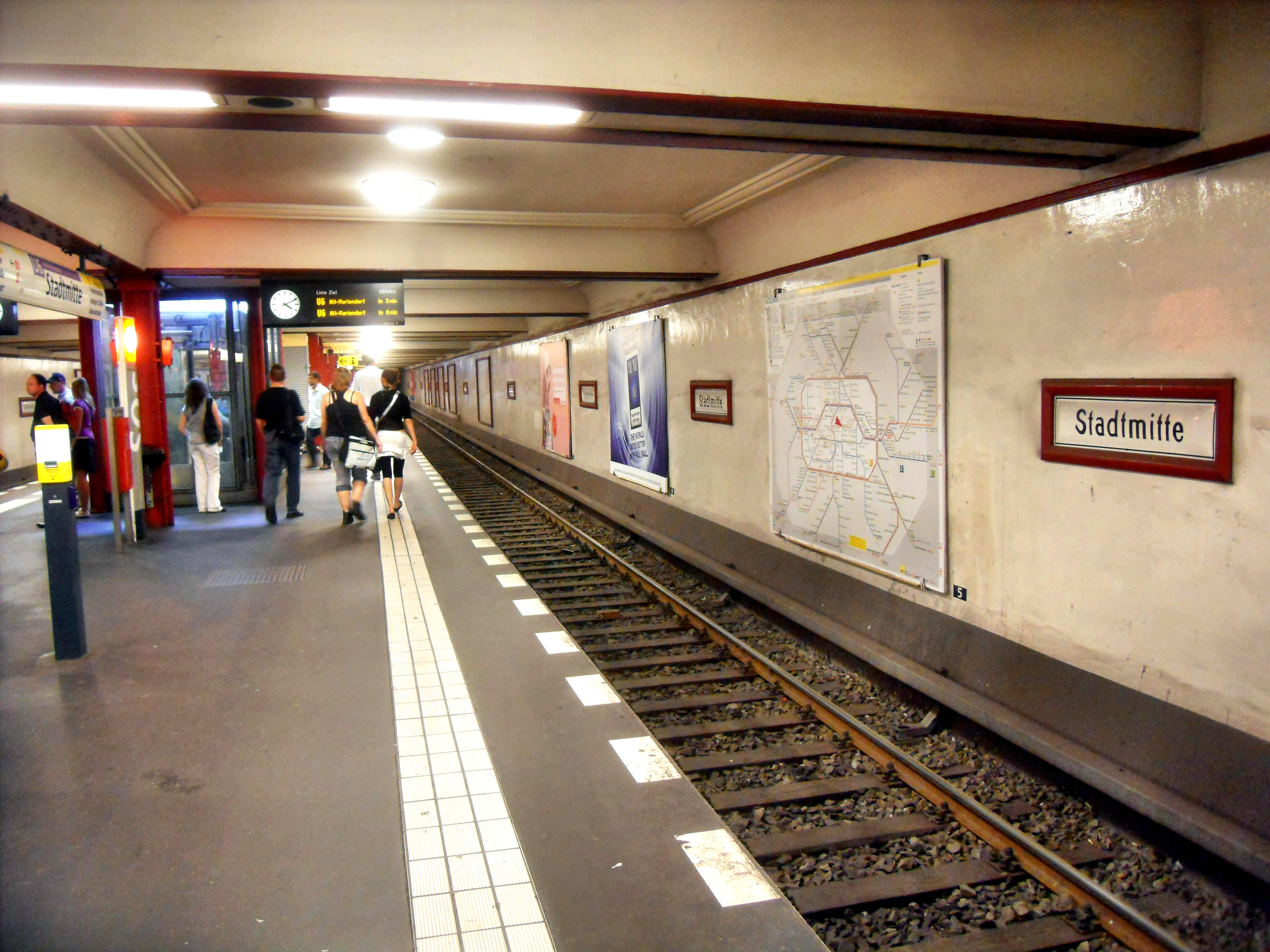 Bahnsteig der U-Bahn-Station Stadtmitte der U-Bahn-Linie U 6 (Richtung Alt-Mariendorf) der Berliner U-Bahn in Deutschland